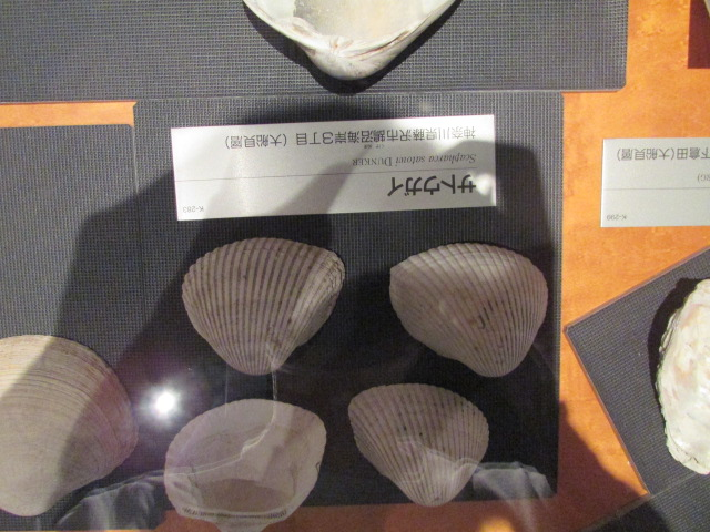 神奈川県立生命の星・地球博物館に展示されている、アカガイの仲間、サトウガイの化石です。